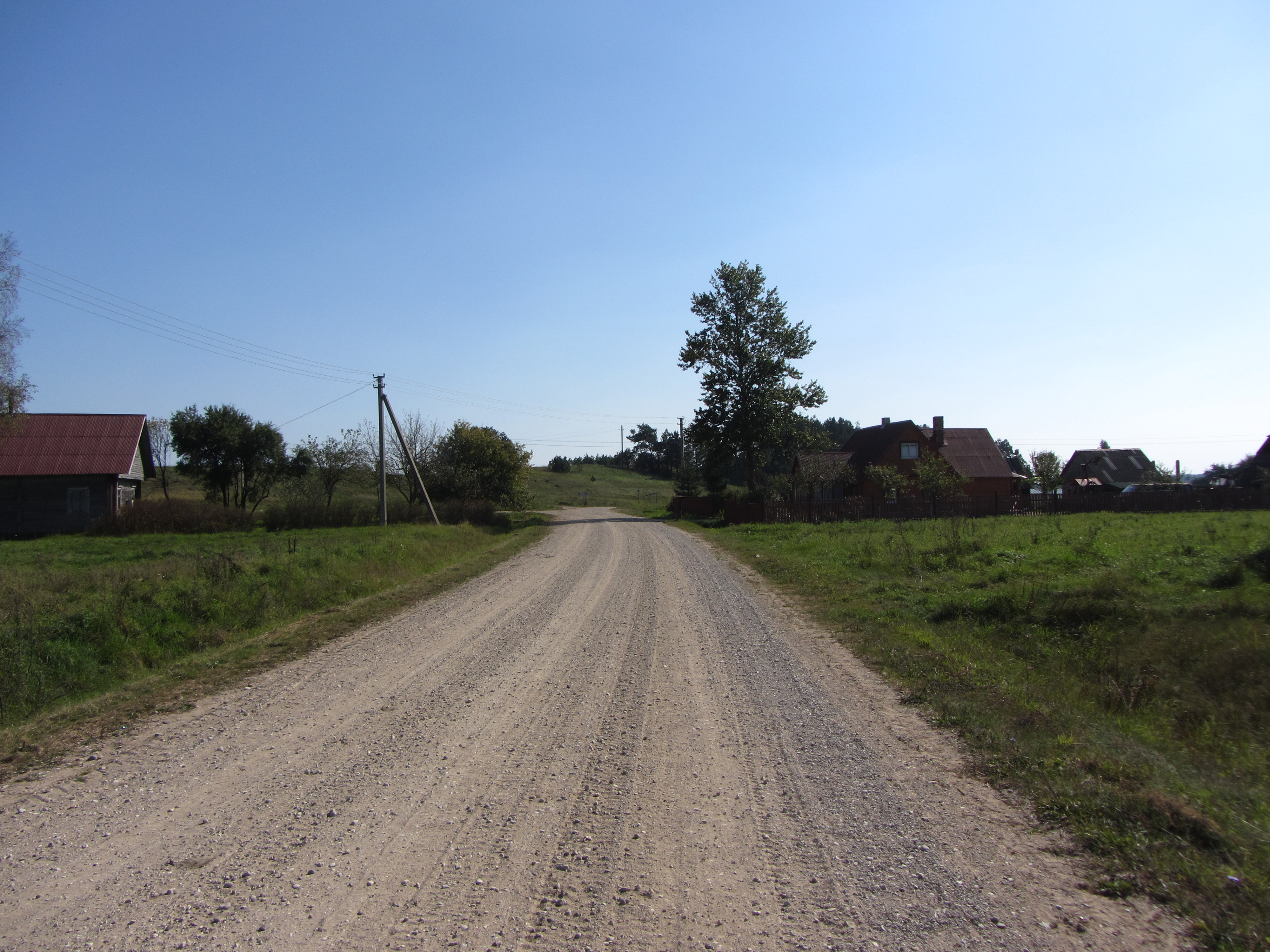 Gudakiemis 21191, Lithuania